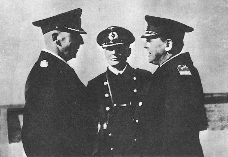 Kmdr Stefan Frankowski (z prawej) i kadm. Hubert Schmundt na Helu w październiku 1939 r.